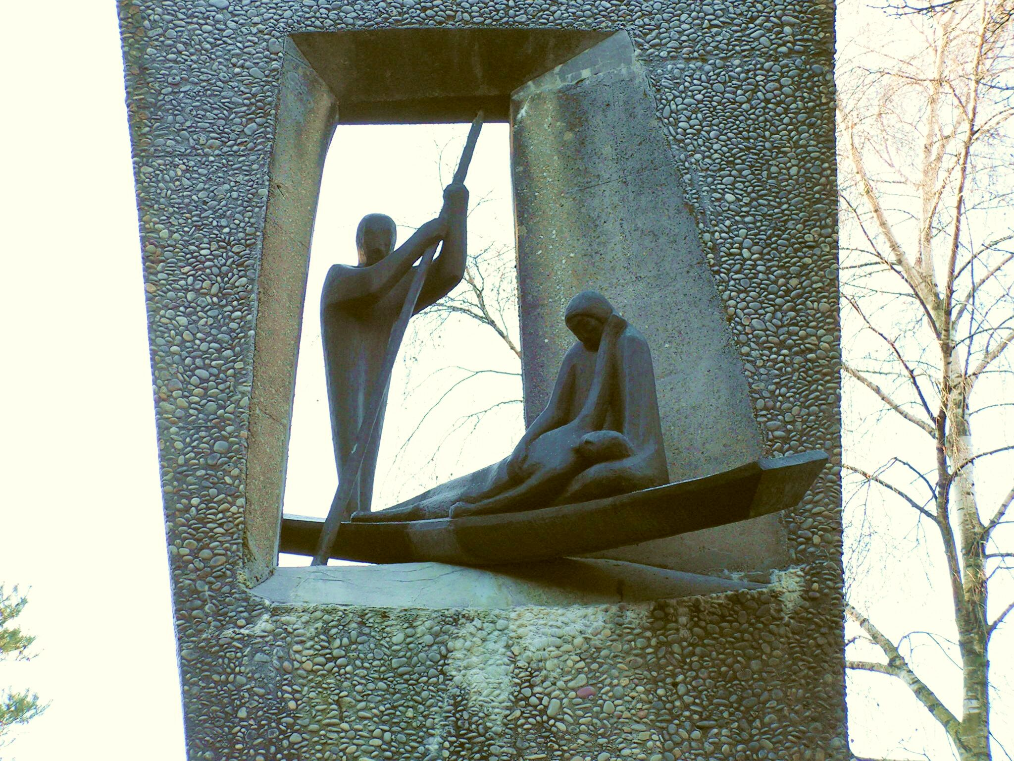 Gedenkstätte Gudendorf/Detail des Mahnmales